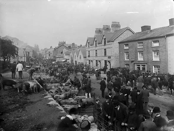 Teitl Cymraeg/Welsh title: Llanfyllin fair Ffotograffydd/Photographer: John Thomas (1838-1905) Dyddiad/Date: [ca. 1885] Cyfrwng/Medium: Negydd gwydr / Glass negative Maint/Dimensions: 16.5 x 21.5 cm. Cyfeiriad/Reference: jth01549 Rhif cofnod / Record no.: 3362500 Rhagor o wybodaeth am gasgliad John Thomas yn Llyfrgell Genedlaethol Cymru More information about the John Thomas Collection at the National Library of Wales Mae ffotograffau John Thomas hefyd yn rhan o Broject Europeana Libraries John Thomas' photographs also form part of the Europeana Libraries Project